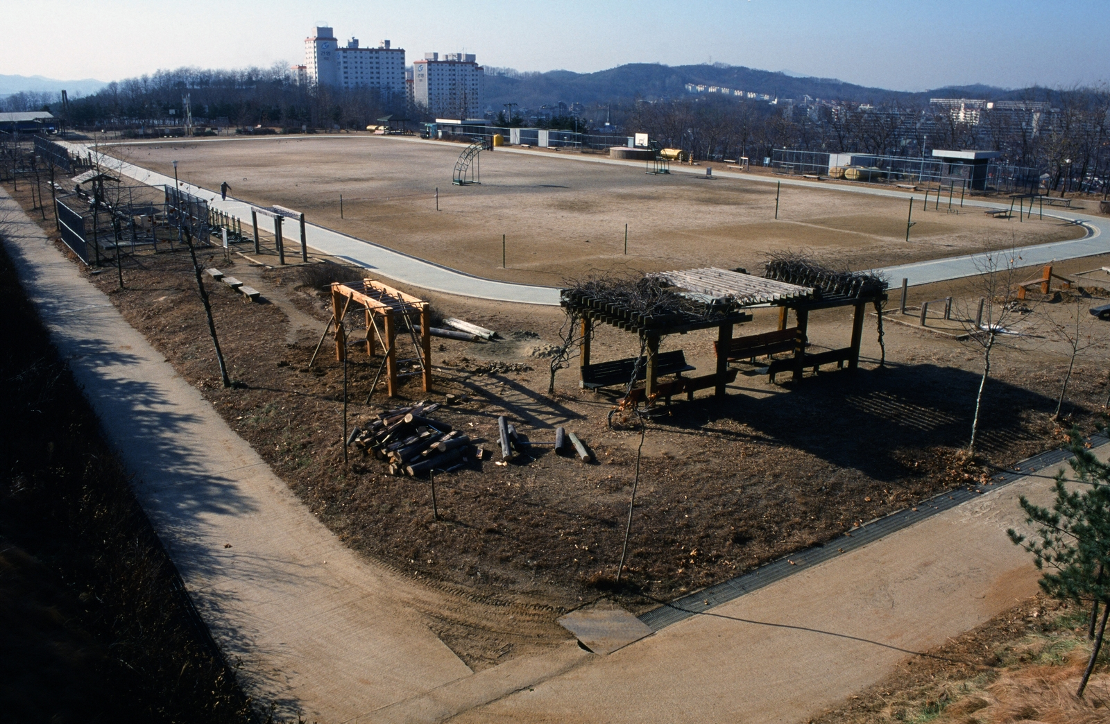 목동 용왕산 시민공원의 모습. 1995년 11월 촬영.